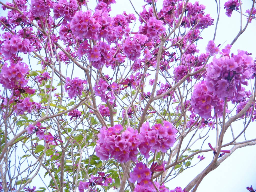 Flora típica do Agreste pernambucano